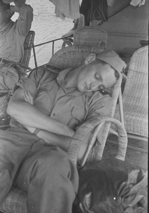 negatief. Slapende militair aan boord van een boot